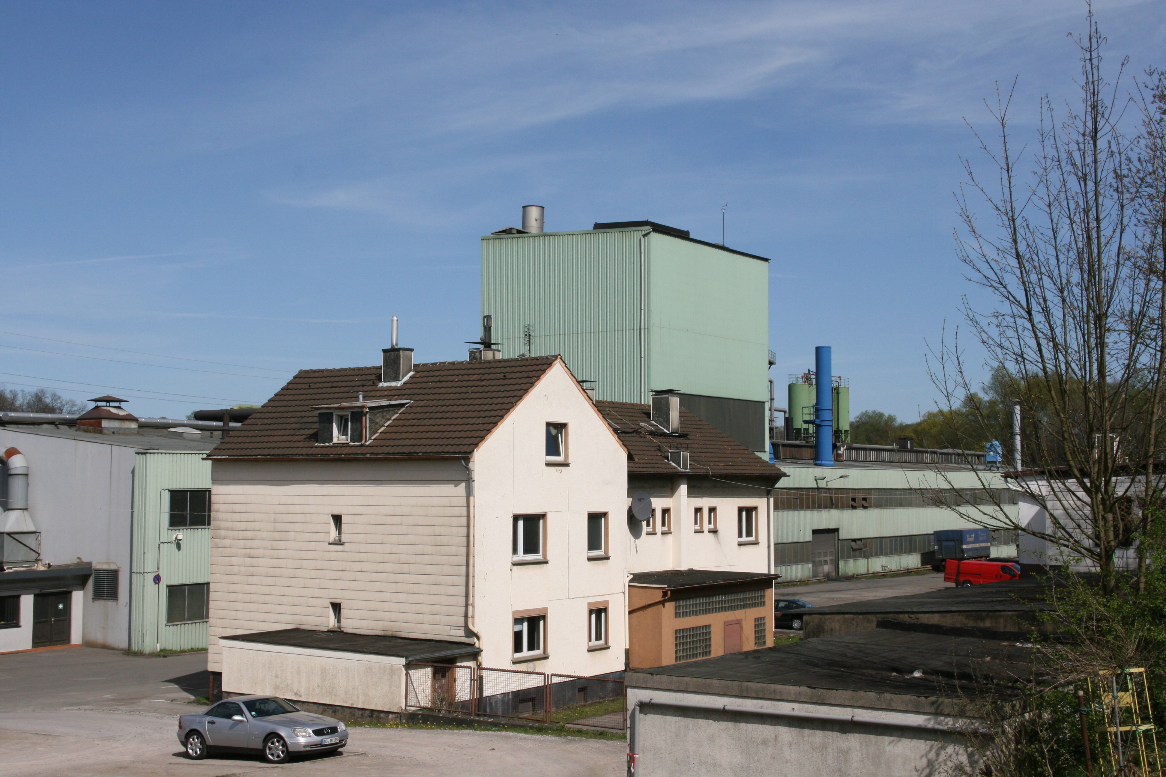 Dieckerhoff Guss, Oststraße 25 in Gevelsberg